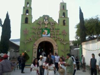 capiila